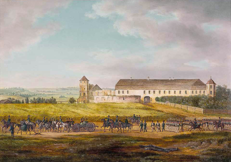 Беларуская (тарашкевіца): Гальшаны (Halšany)